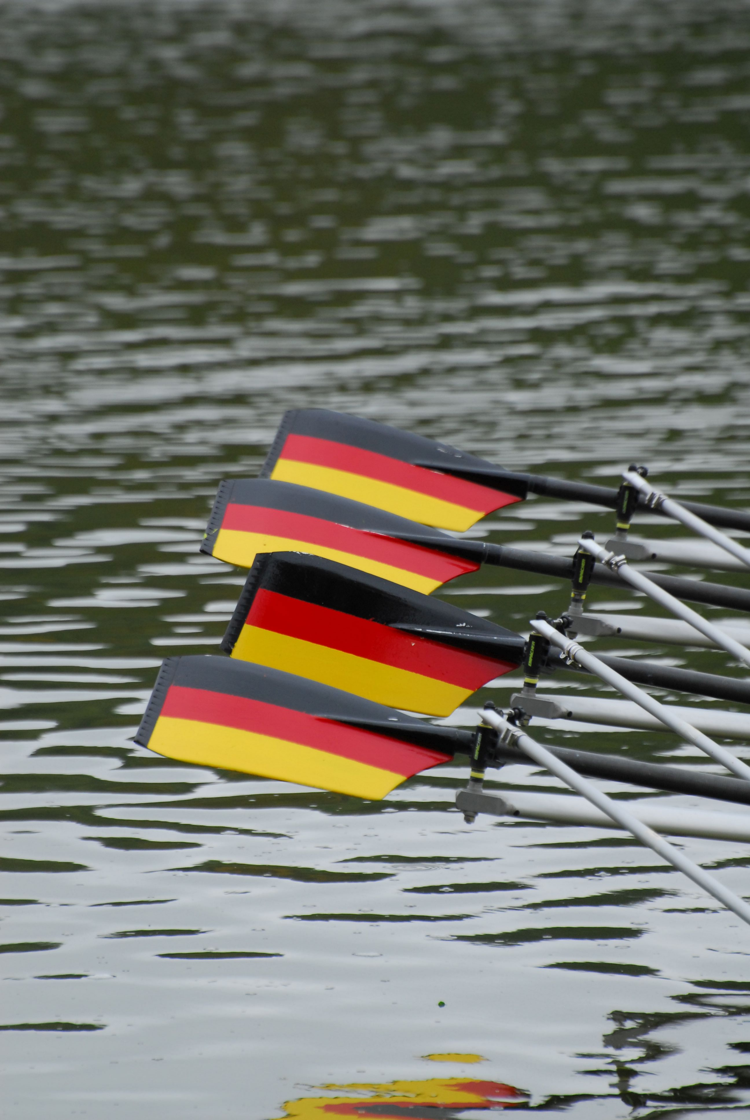 Ruderblätter in Deutschlandfarben